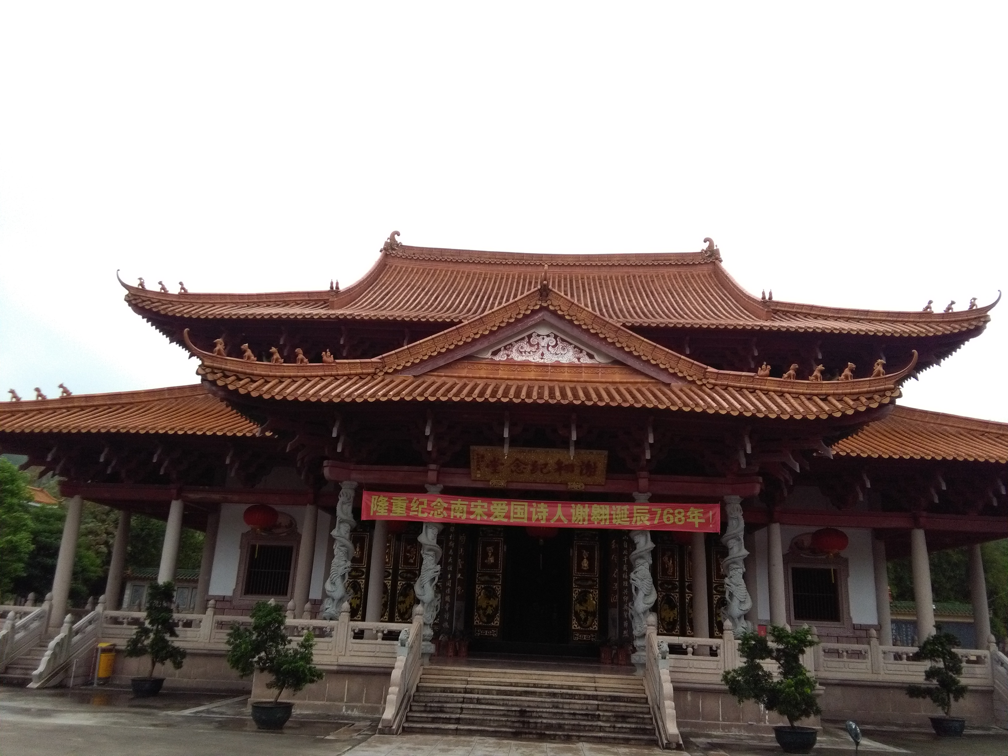 謝翱紀念館，揭陽